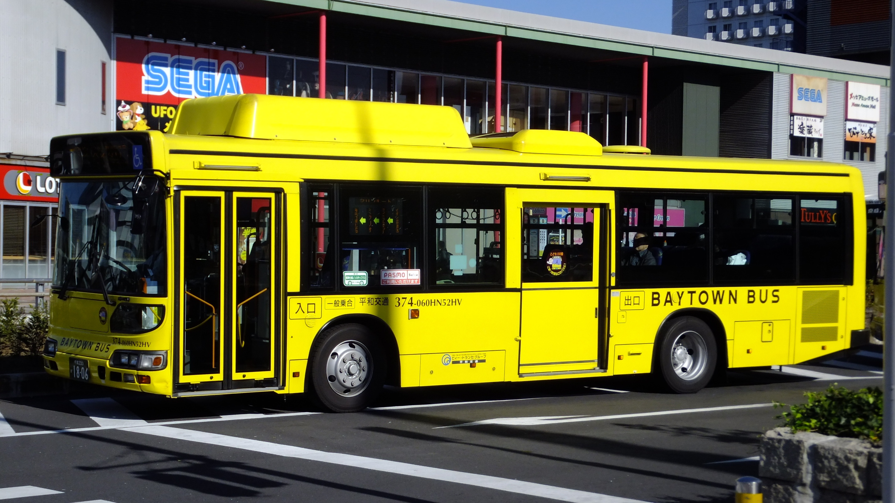 平和交通（ベイタウンバス）374号車。海浜幕張にて